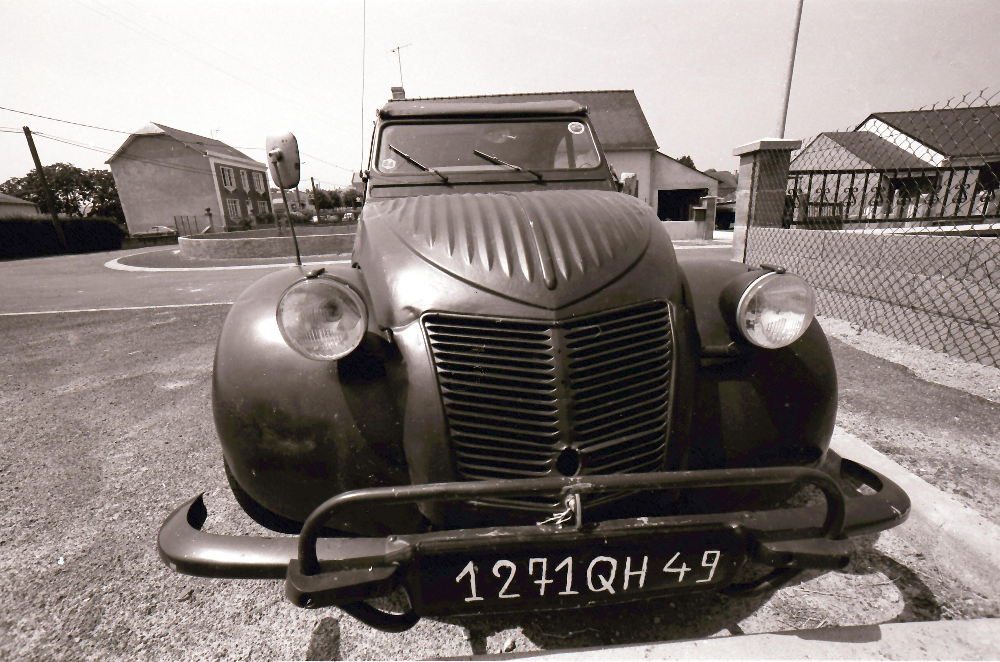 Citroën 2CV 1949-60